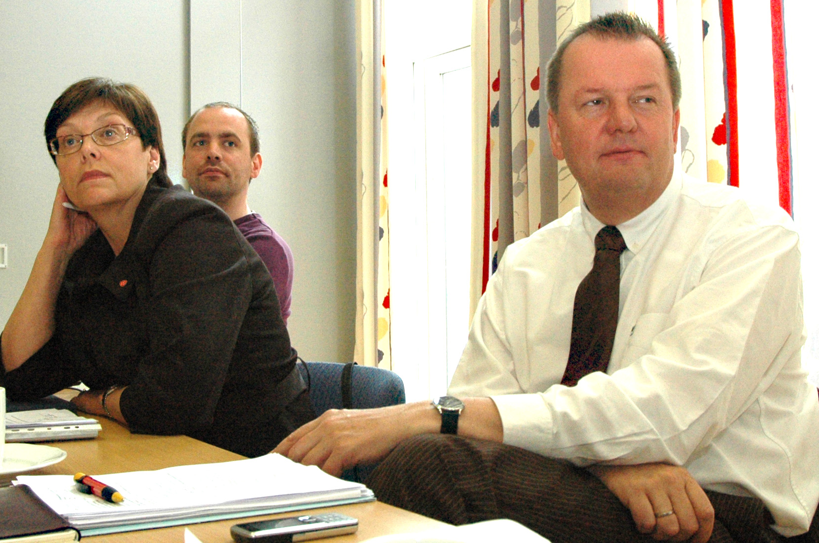 Gerd Janne Kristoffersen, Arild Stokkan-Grande og Inge Ryan